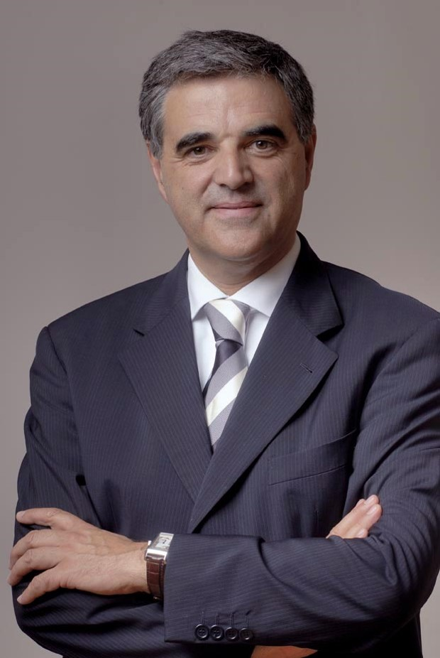 Fotografia de Manuel Tarré